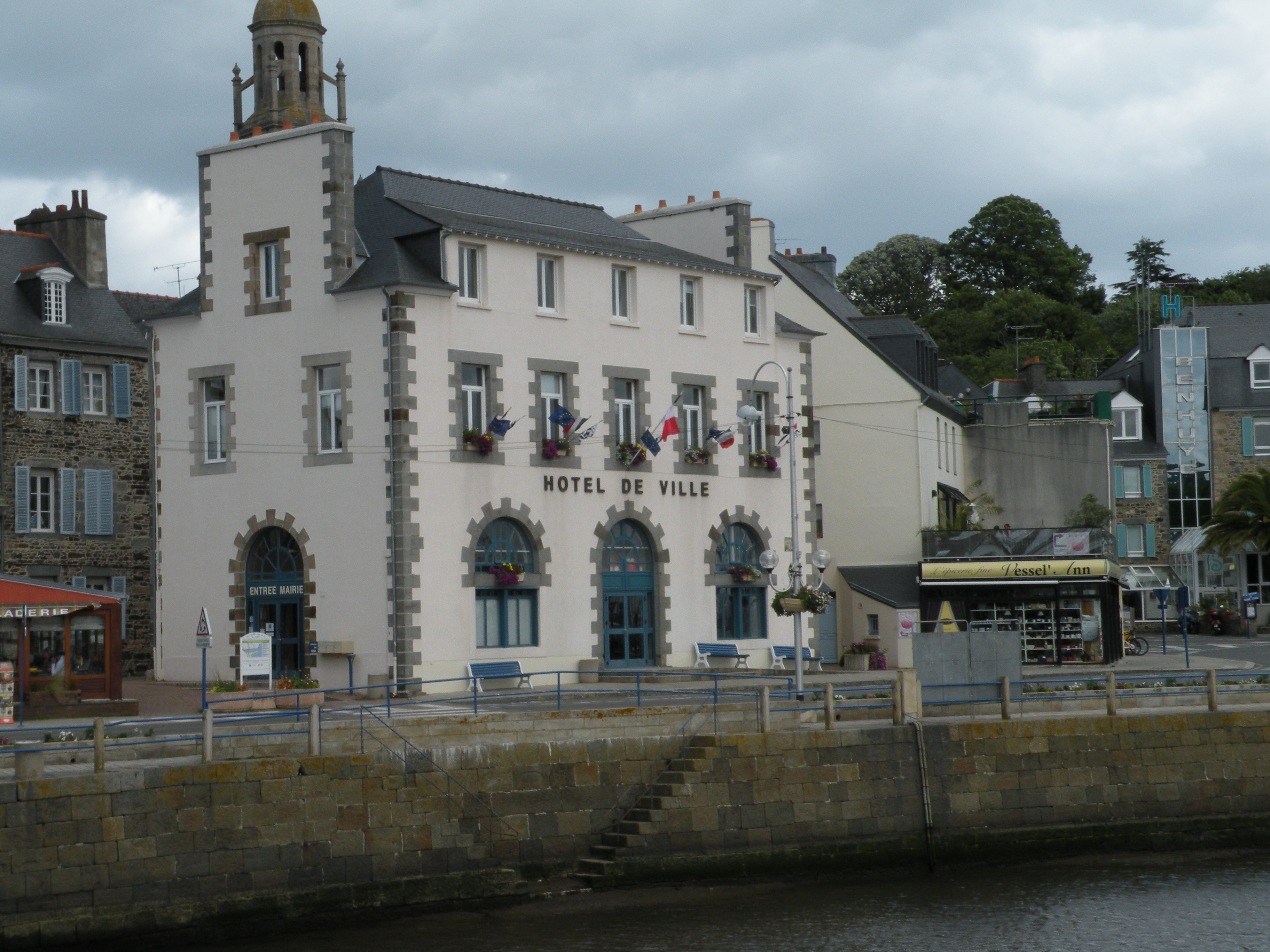 L'hôtel de ville de Binic.